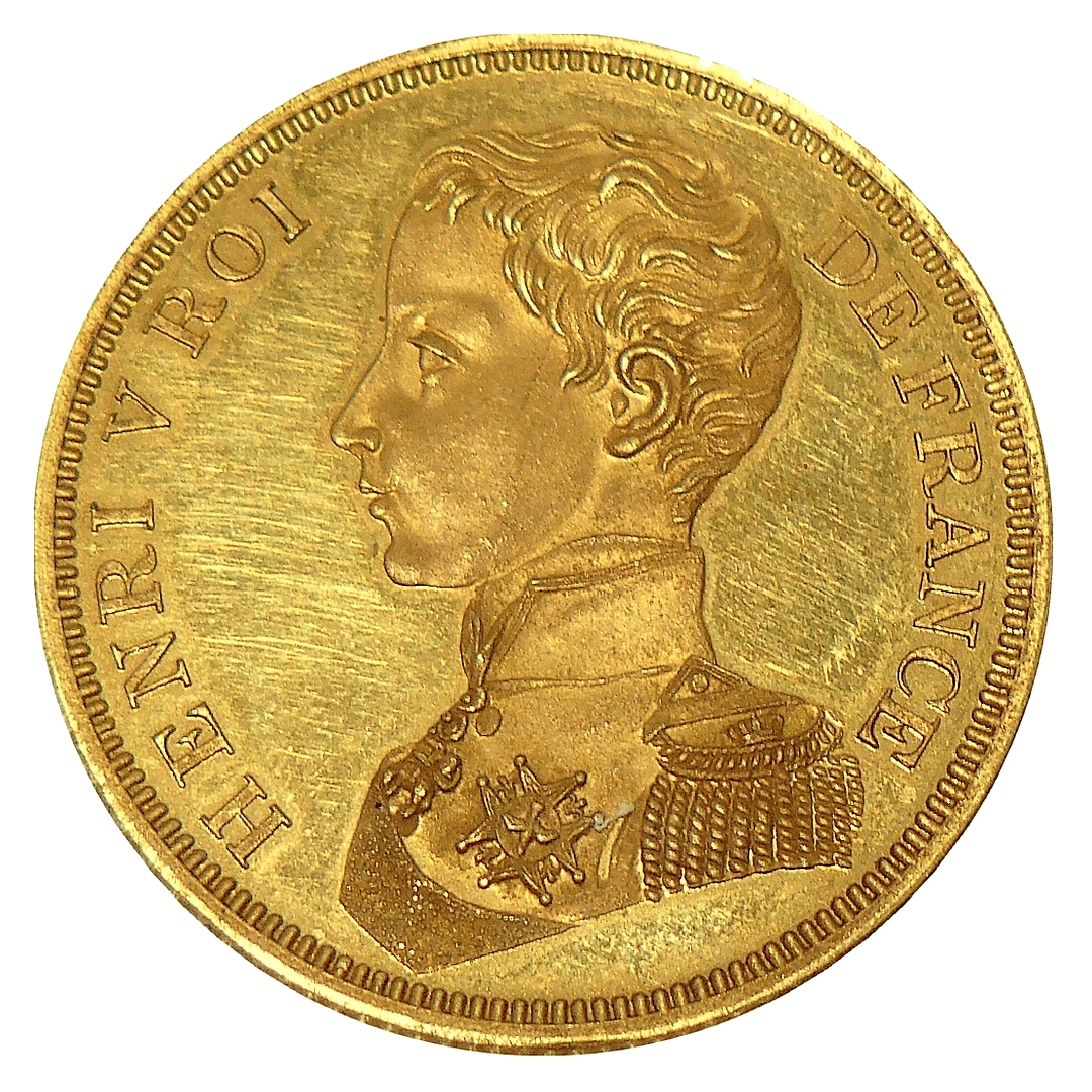 Essai en or de la pièce de 5 francs au nom d'Henri V roi de France - 1832 - Diam. 25 mm - Cabinet des médailles, Paris, n° Inv. BN 4028